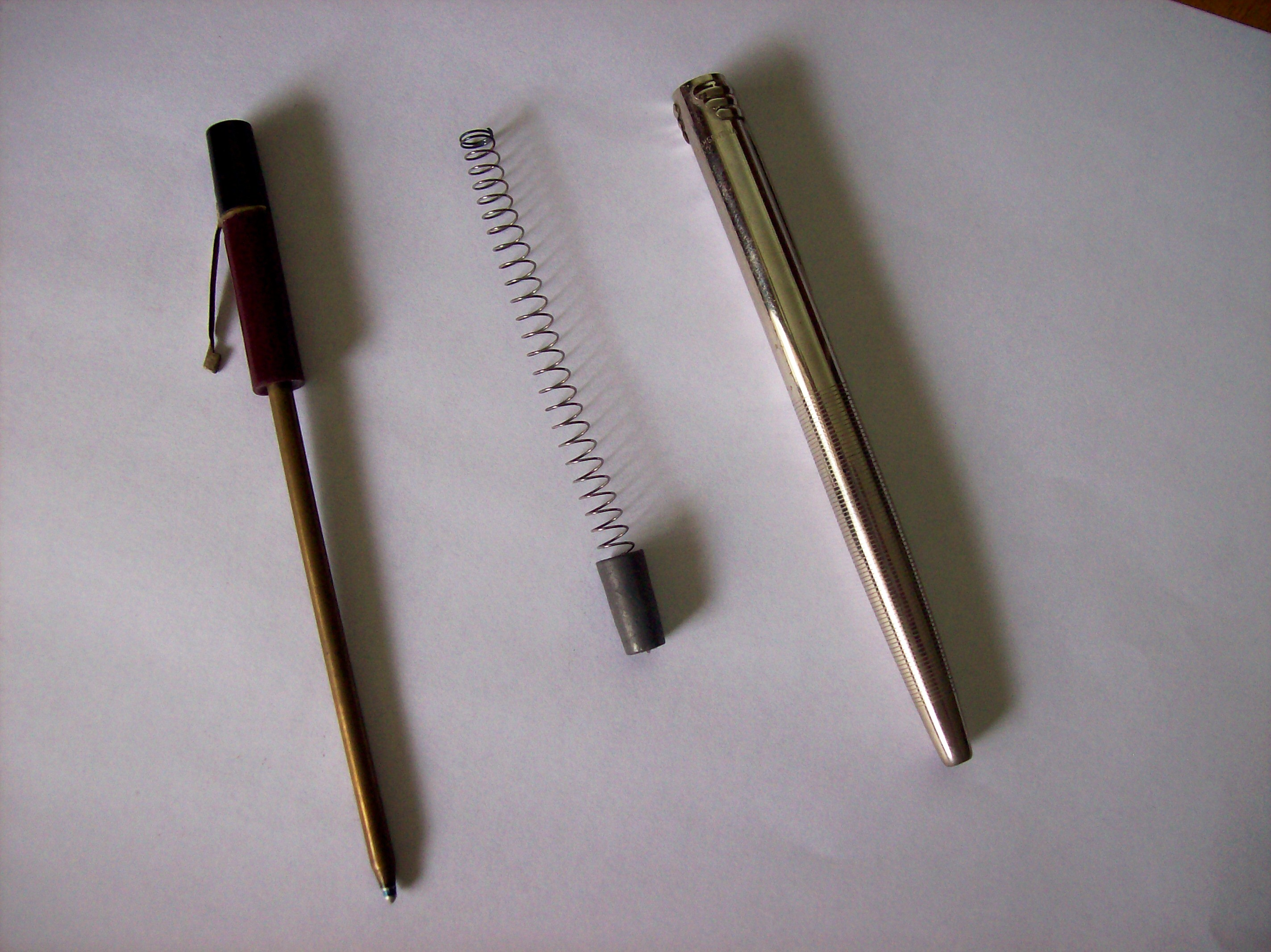 Primer bolígrafo marca "Biro", made in Argentina